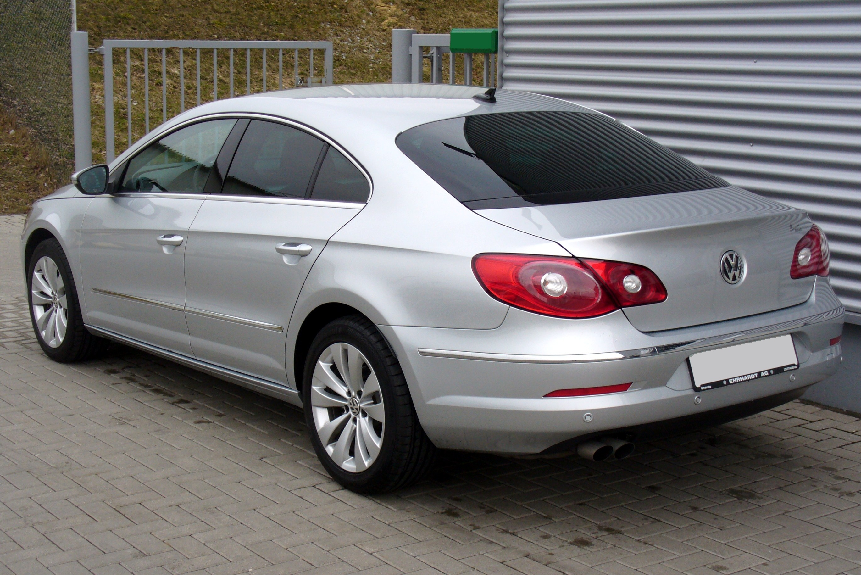 VW Passat CC